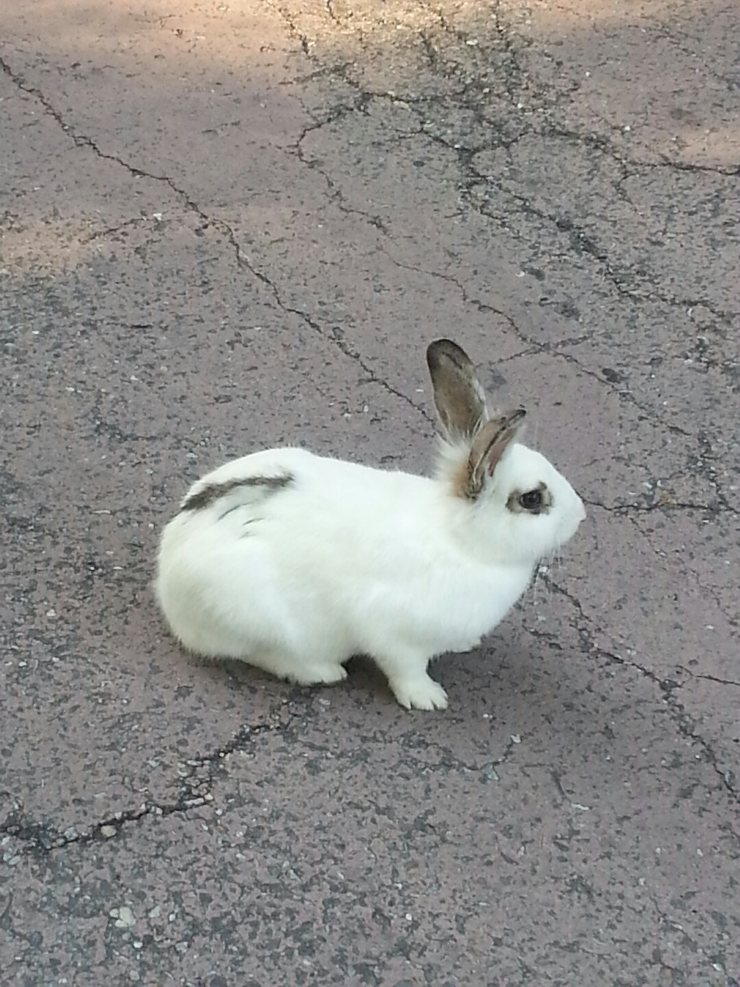 Taken by Choe Kwangmo with iPhone